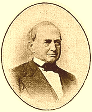 Richard Freiherr von Friesen (1808-1884), sächsischer Staatminister. Fotografie um 1870